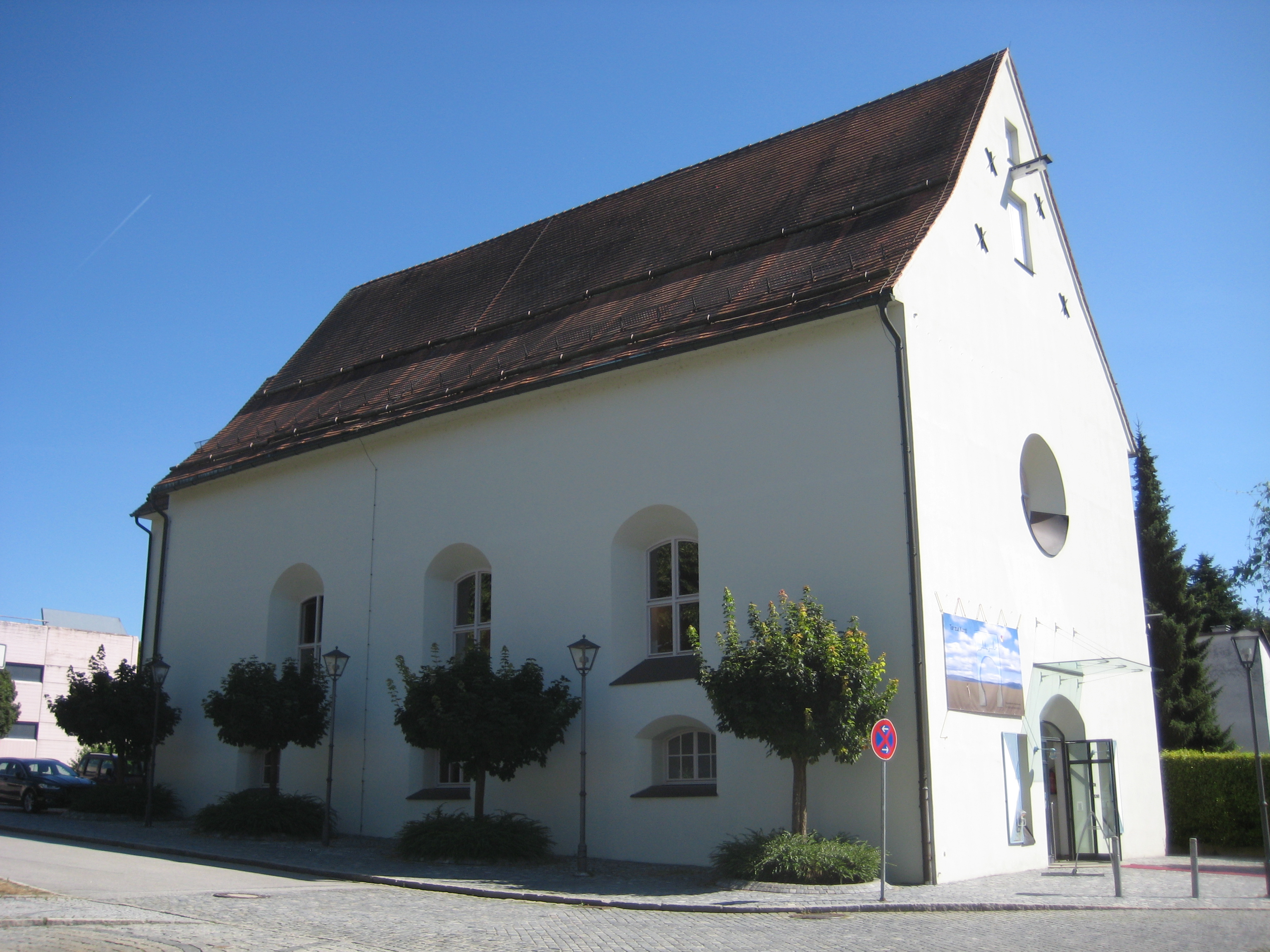 Ehemals Langhaus der profanierten Kapuzinerkirche, jetzt Kulturhaus (zweigeschossiger Steildachbau mit Fassaden-Oculus, 1625-29)This is a photograph of an architectural monument.